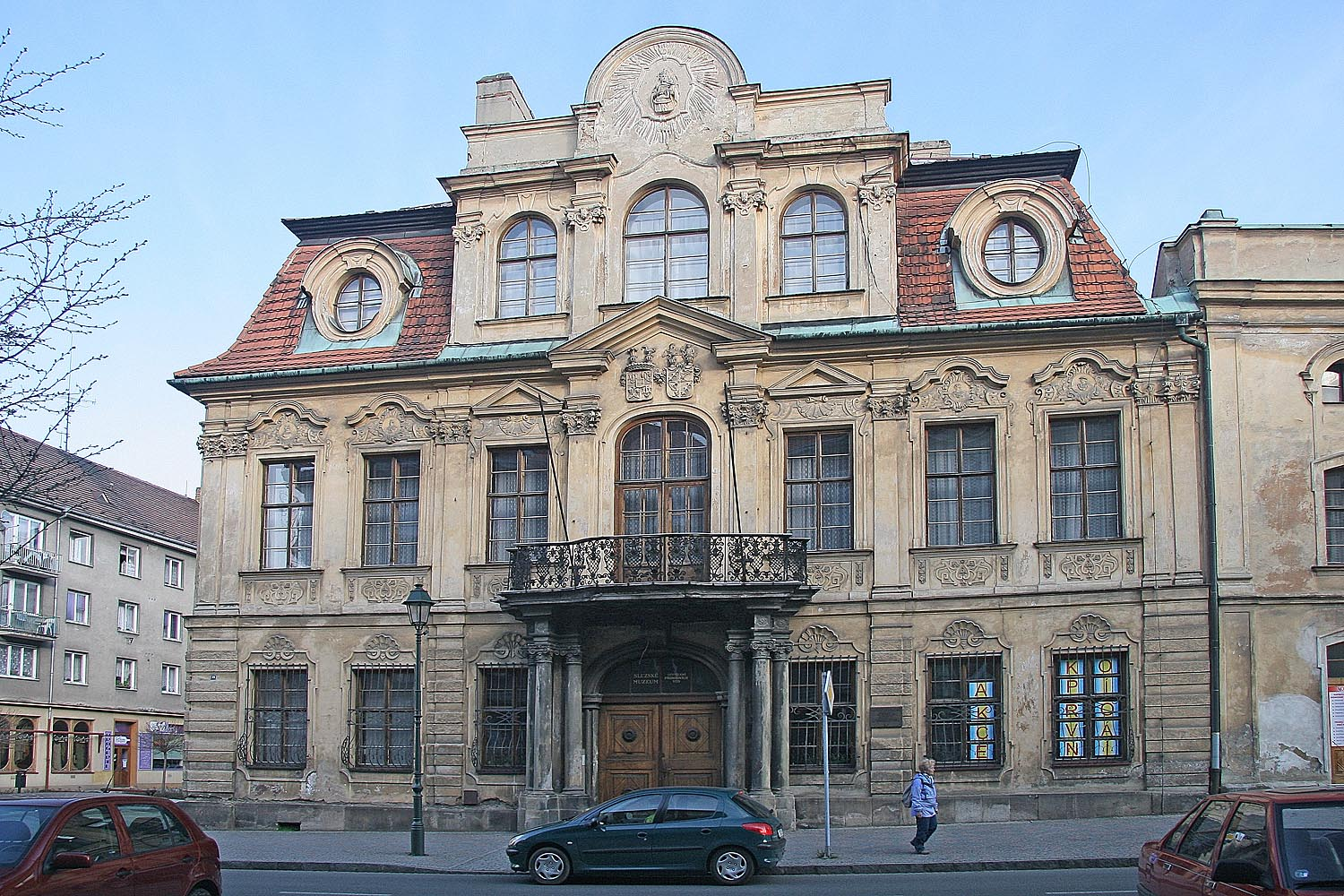 barokní Blücherův palác v Opavě, district Opava, Czech Republic